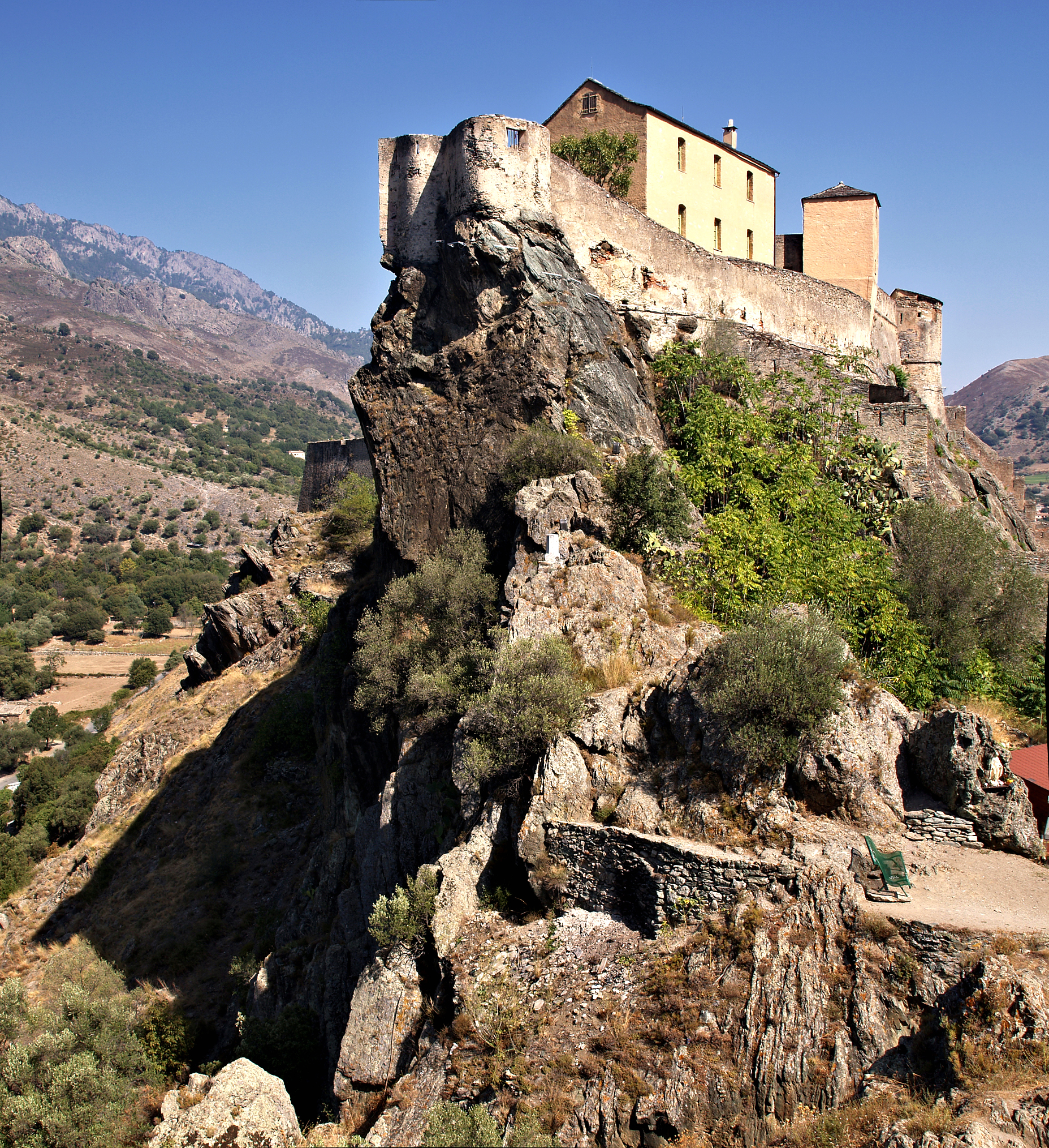 Corte (Corsica) - La citadelle